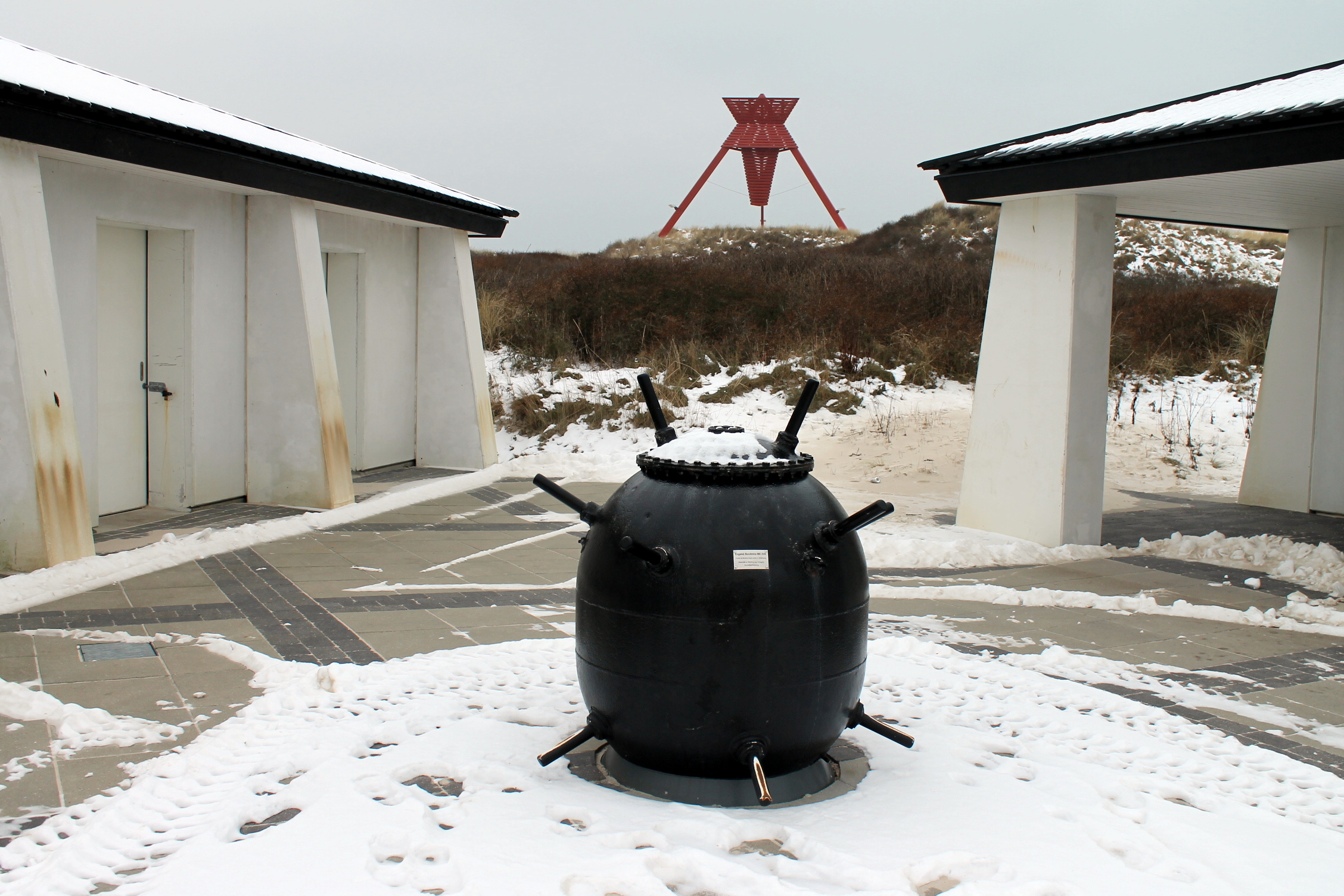 Blokhus - Engelsk Bundmine MK XVII og Blokhus Sømærket